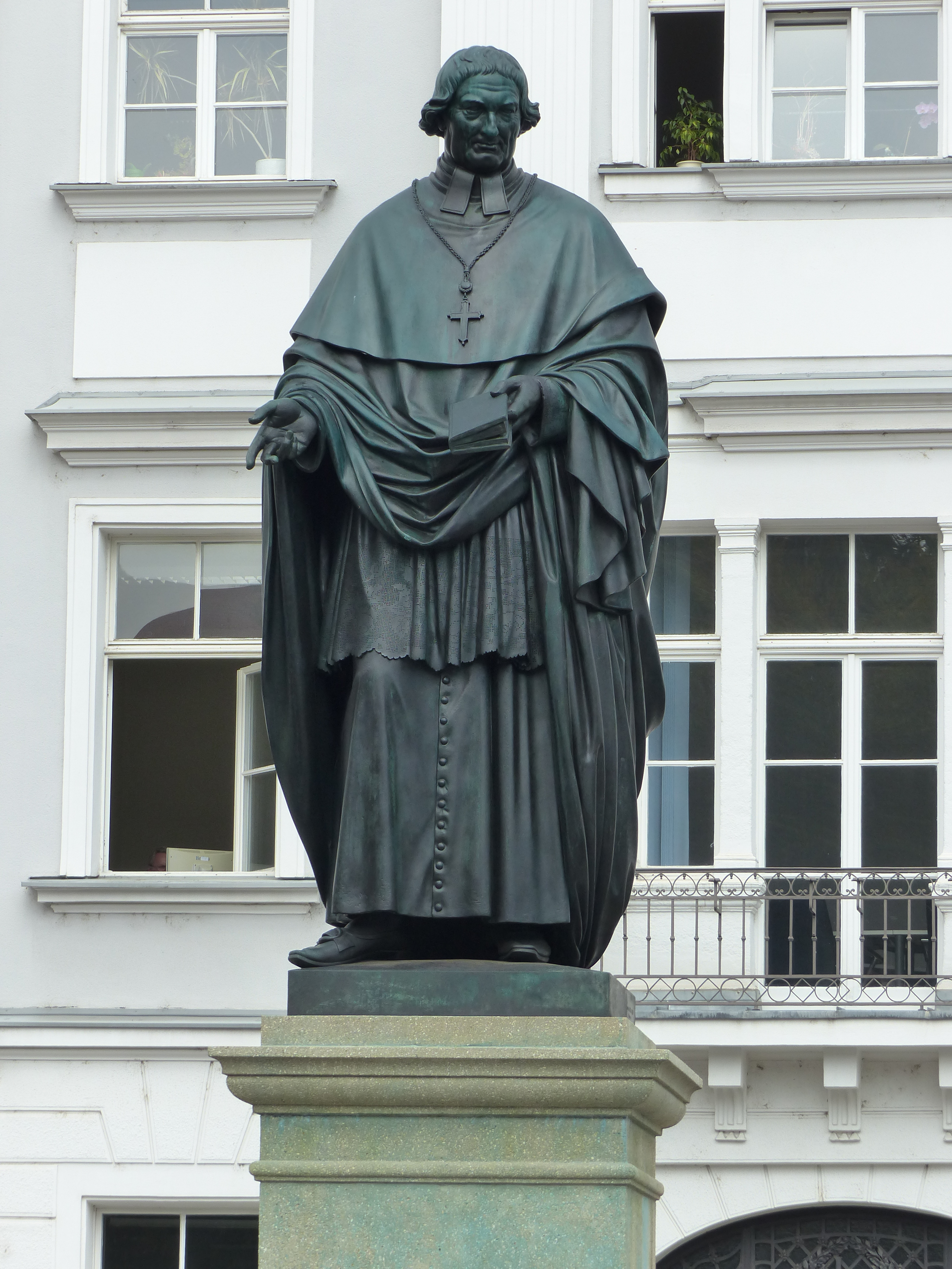 Denkmal Johann Michael Sailer, Bischof von RegensburgThis is a photograph of an architectural monument.